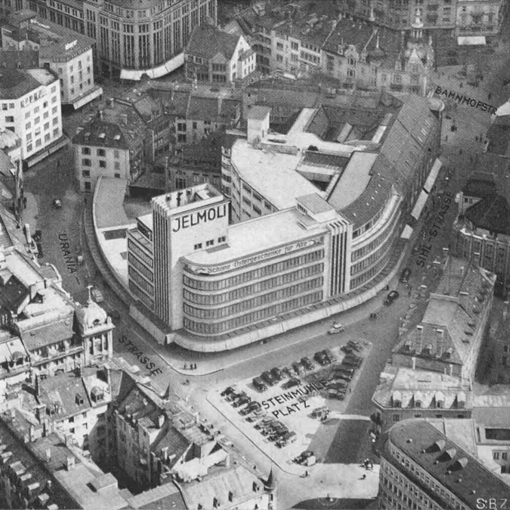 Warenhaus Jelmoli auf dem Areal der ehemaligen Seidenhöfe. Aufnahme entstand vor 1940. Der Glaspalast von 1899 von Stadler und Usteri (oben rechts) ist mit den Erweiterungsbauten von Pfleghard und Haefeli (Ausbau des Innenhofs des Glaspalastes) und von Johann Emil Schaudt versehen.